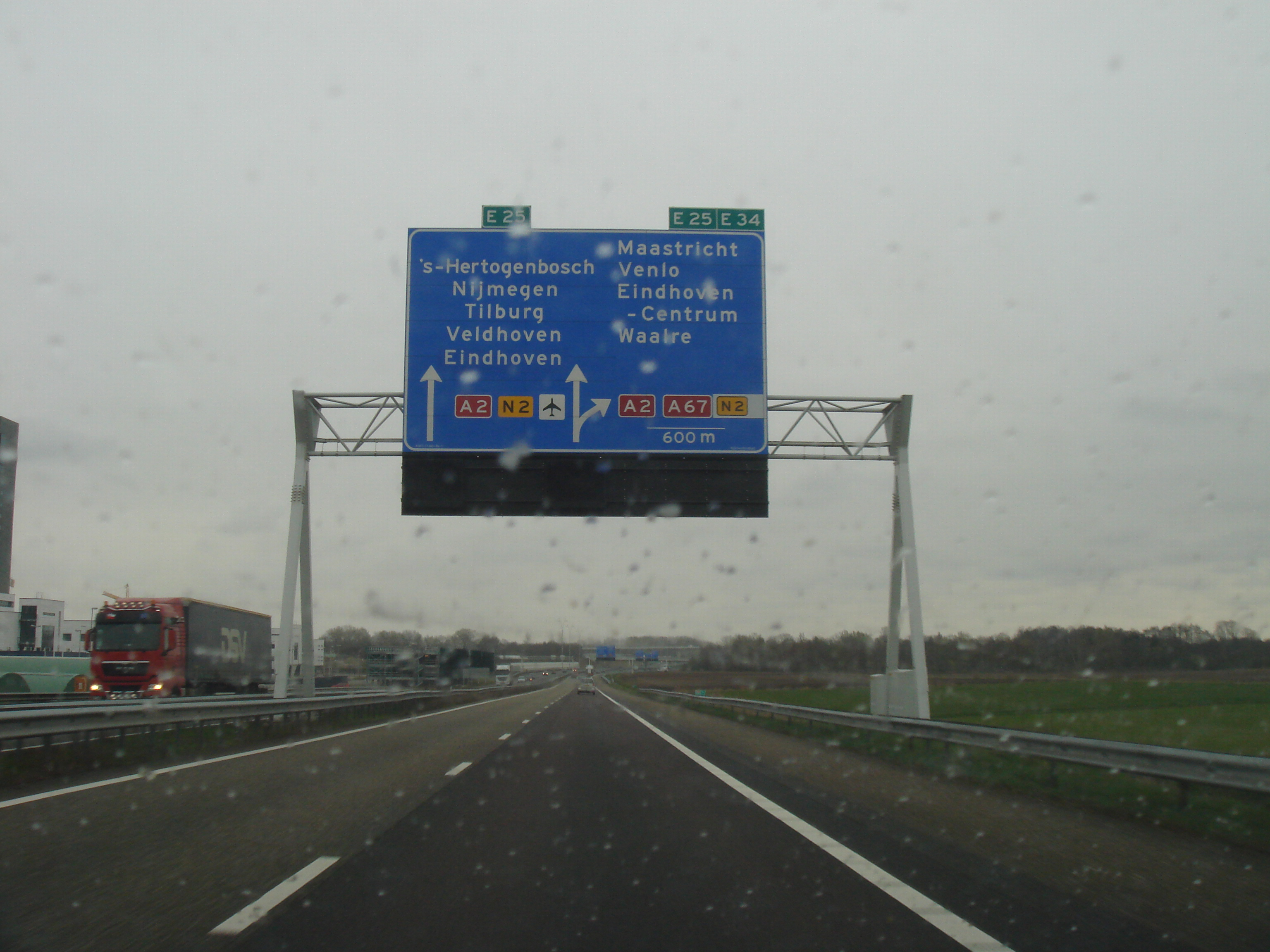 Panneau de direction sur l'autoroute A67 au niveau de l'échangeur De Hogt (Eindhoven)